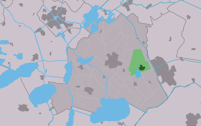 Kaartsje fan himrik fan Aldehaske